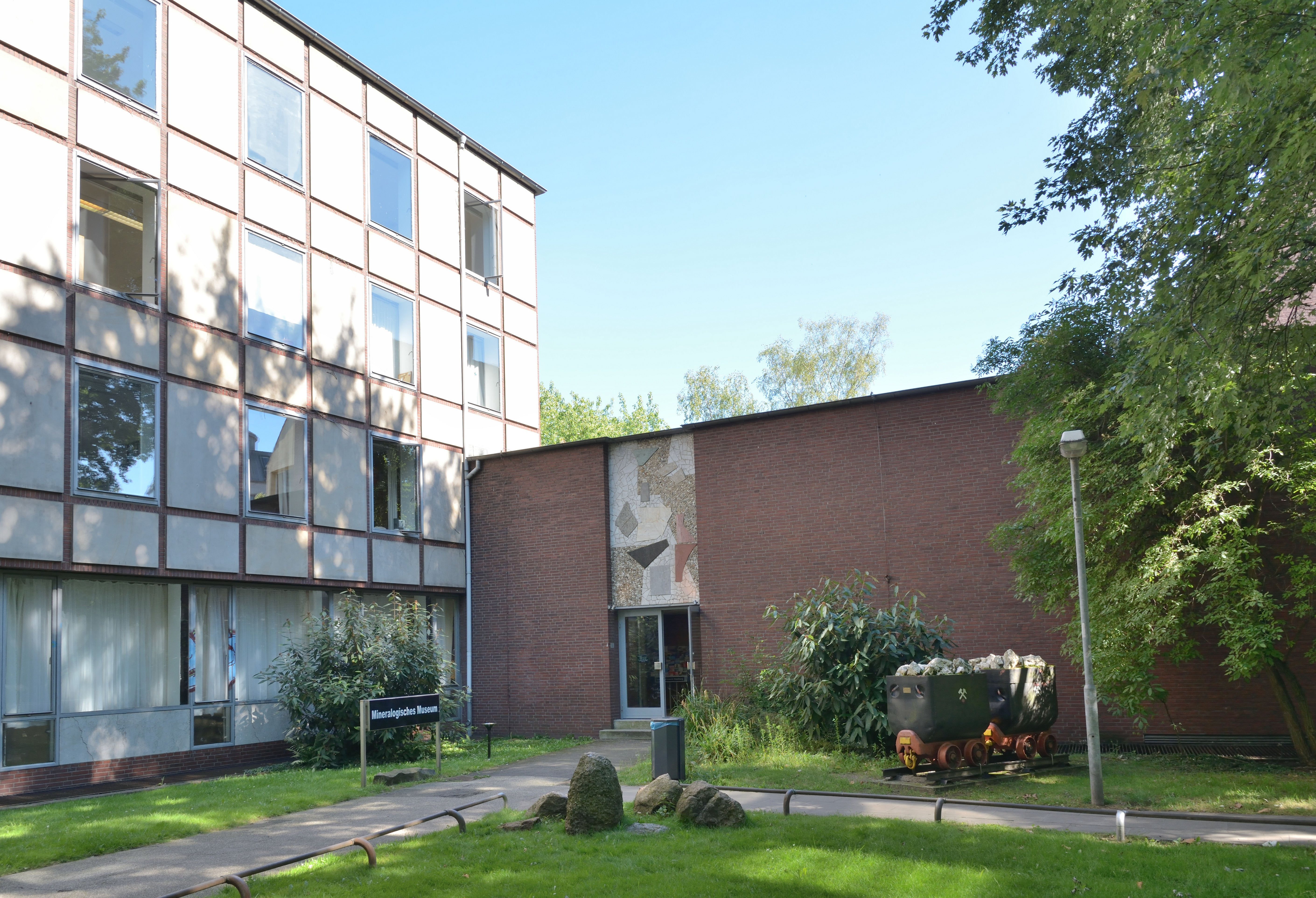 Impressionen aus dem Mineralogisches Museum Hamburg